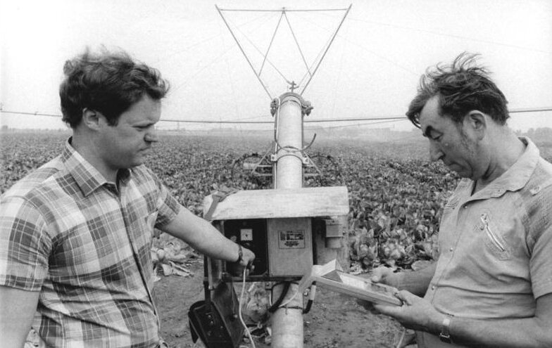 Letschin, Beregnungsanlage der LPG ADN-ZB Link 24.8.1989-mx.Bez. Frankfurt-Oder: Beregungstechnik- Eine neuentwickelte, mikroelektronisch gesteuerte Beregnungsanlage nahmen die Bauern der LPG (P) Letschin im Oderbruchkreis Seelow in Betrieb. Damit ist die Genossenschaft in der Lage, weitere 533 Hektar Feldfrüchte, vor allem Gemüse, mit Wasser zu versorgen.